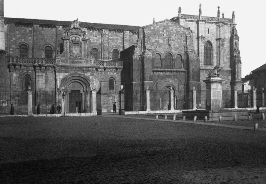 Imatge